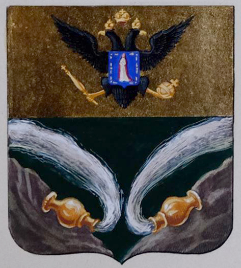 Беларуская (тарашкевіца): Докшыцы (Dokšycy). Расейскі герб места